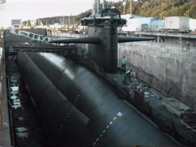 USS Nevada (SSBN-733)